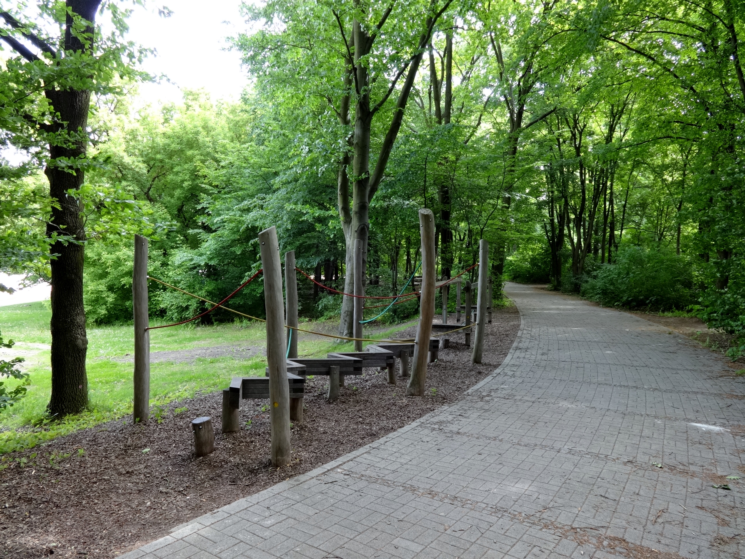 Park am Buschkrug im Berliner Ortsteil Britz (Bezirk Neukölln). In der ehemaligen Sandgrube wurde 1952 ein Park angelegt, in dem sich heute ein Fitness-Pfad befindet.